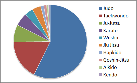 Tortendiagramm Mitglieder Dachverband für Budotechniken Nordrhein-Westfalen